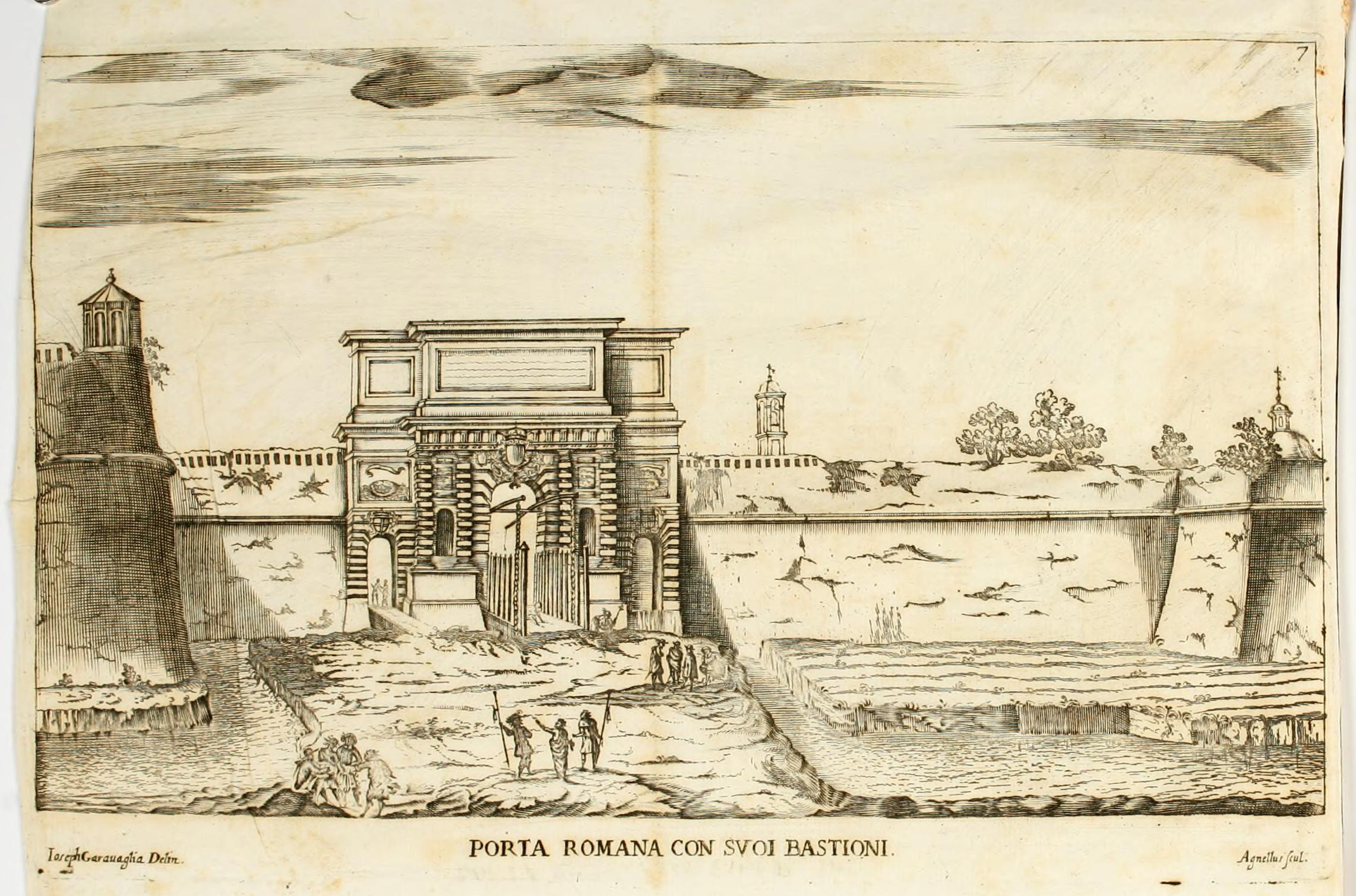 Porta Romana con i suoi bastioni spagnoli, Milano, di Carlo Torre, 1714 dal volume Il ritratto di Milano, 1714